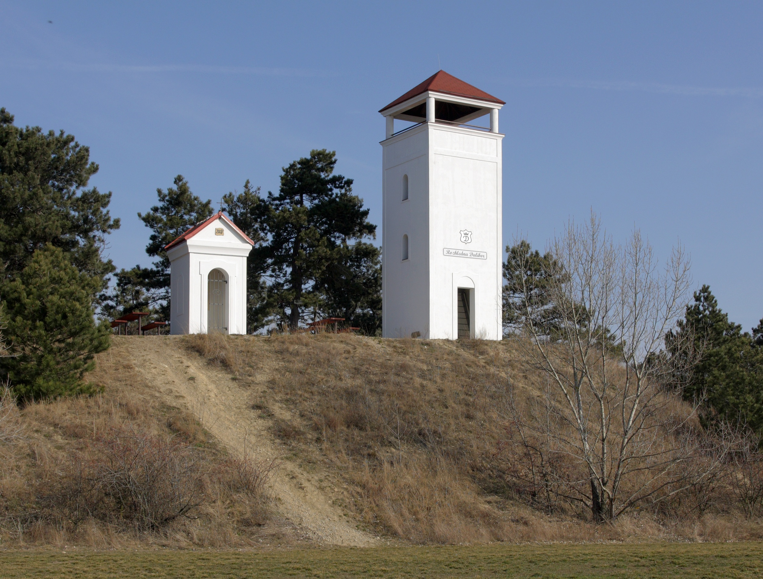 Zaječí - rozhledna Dalibor a kaple sv. Urbana.